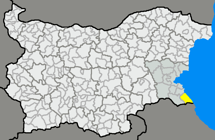 Община Царево на картата на област Бургас, България